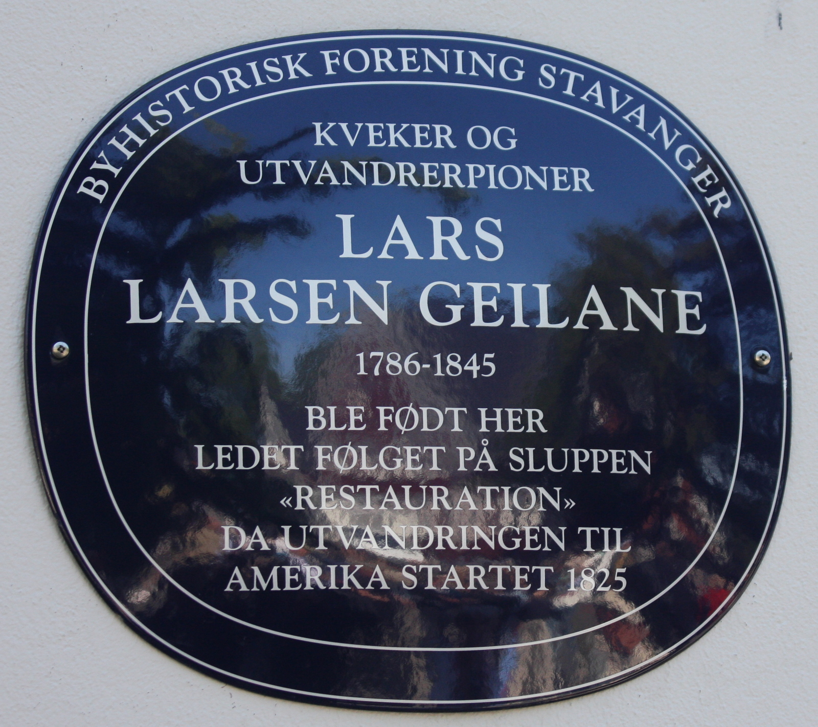 Minnesmerke til minne om Lars Larsen Geilane